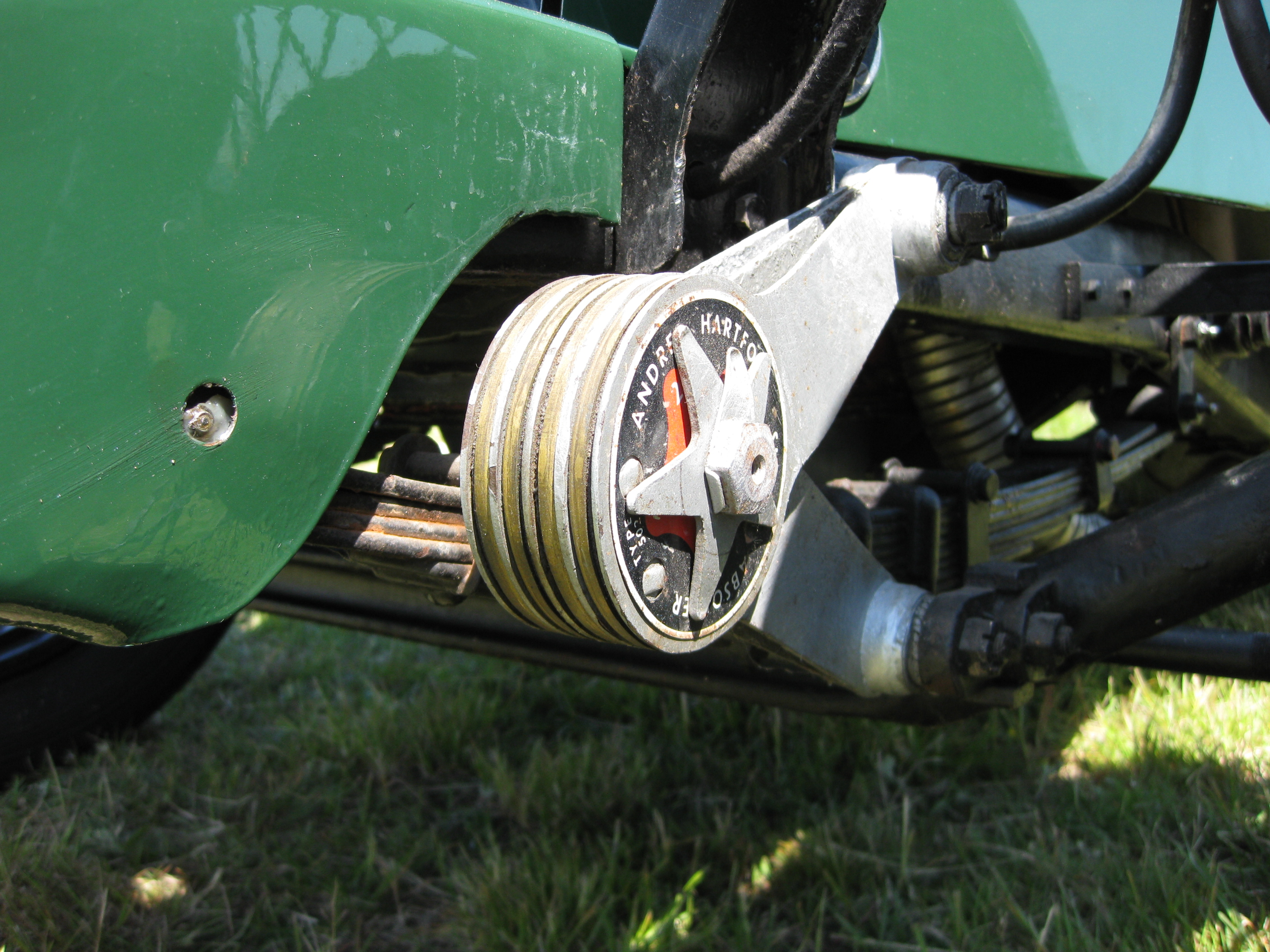 Singer (1941) Detailansicht Radaufhängung